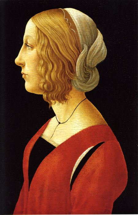 Предполагаемый портрет Лукреции Марии Ромолы Медичи (1470 - 1553) кисти Сандро Боттиччелли или Раффаэллино дель Гарбо.